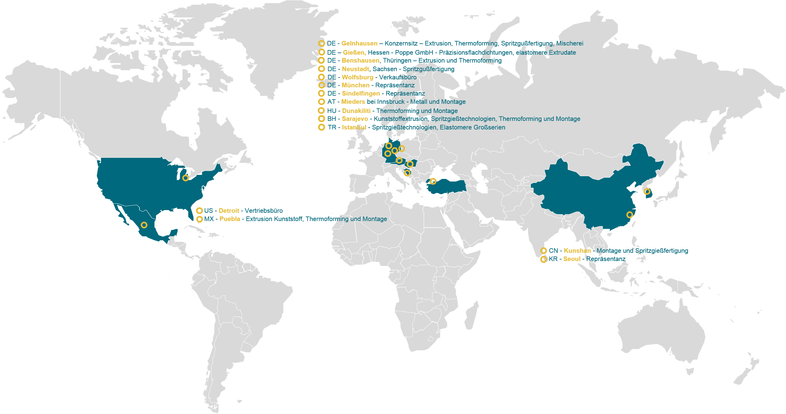 15 Standorte - Präsent auf den 3 großen Automobilmärkten